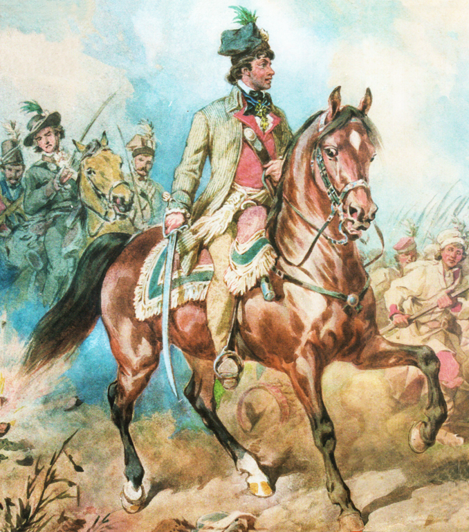 Tadeusz Kościuszko during battle of Racławice